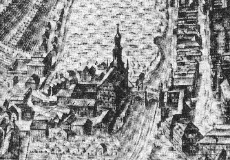 Das Heilig-Geist-Spital Eichstätt aus dem Hochstiftkalender von 1758, Zeichnung von Maurizio Pedetti